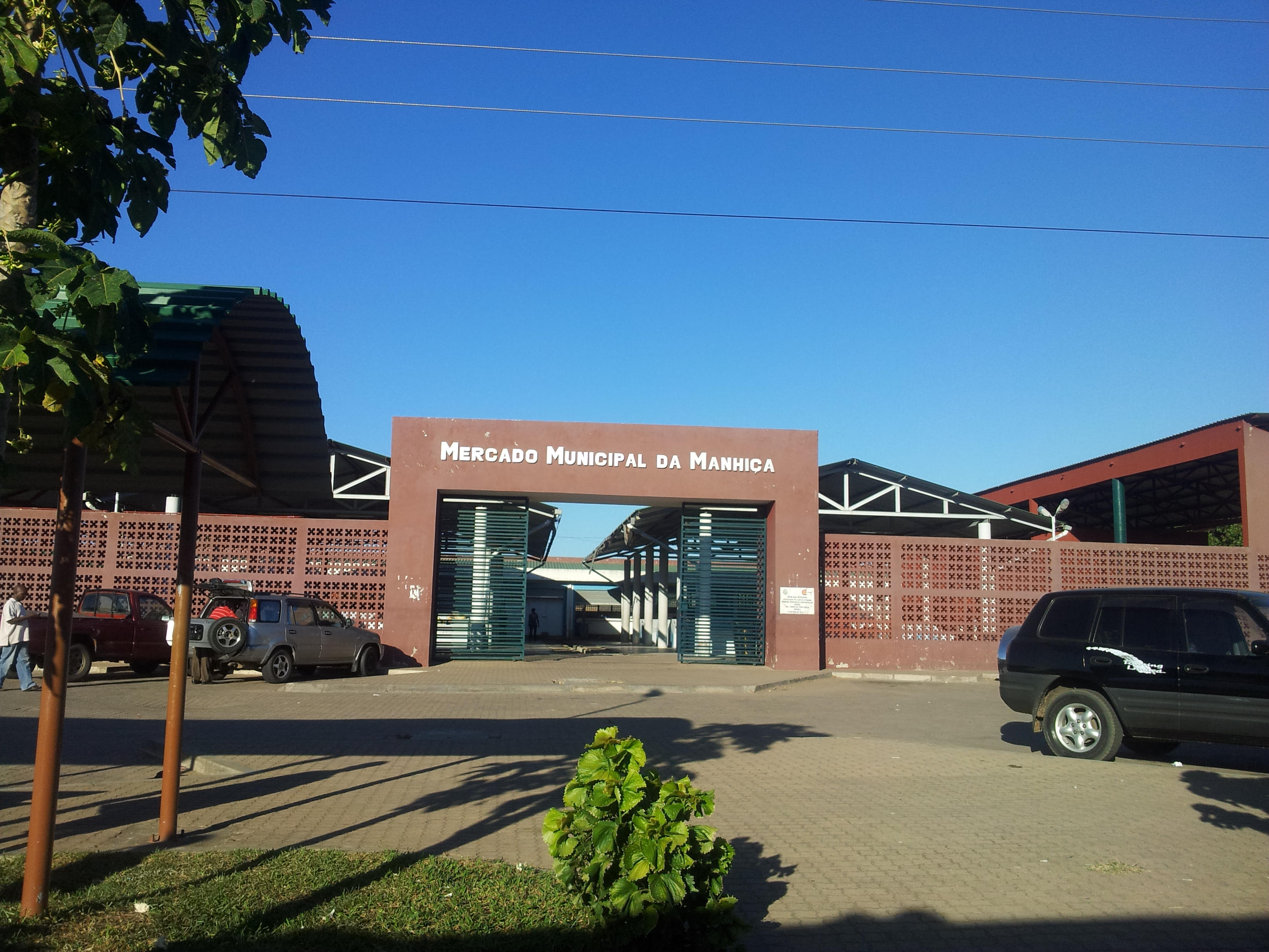 Mercado Municipal de Manhiça, Moçambique